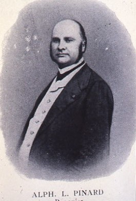 Foto di Alphonse Pinard